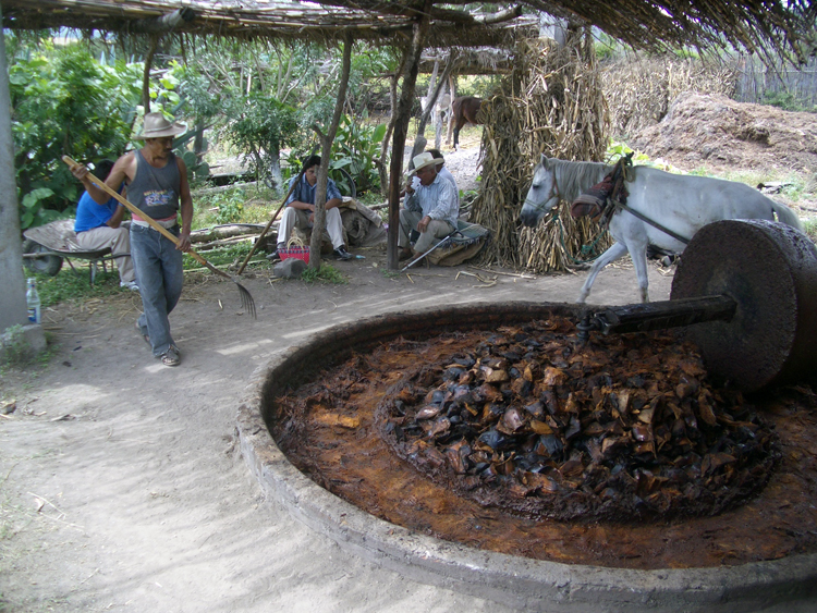 Molino de maguey-roast agave grinding mill)